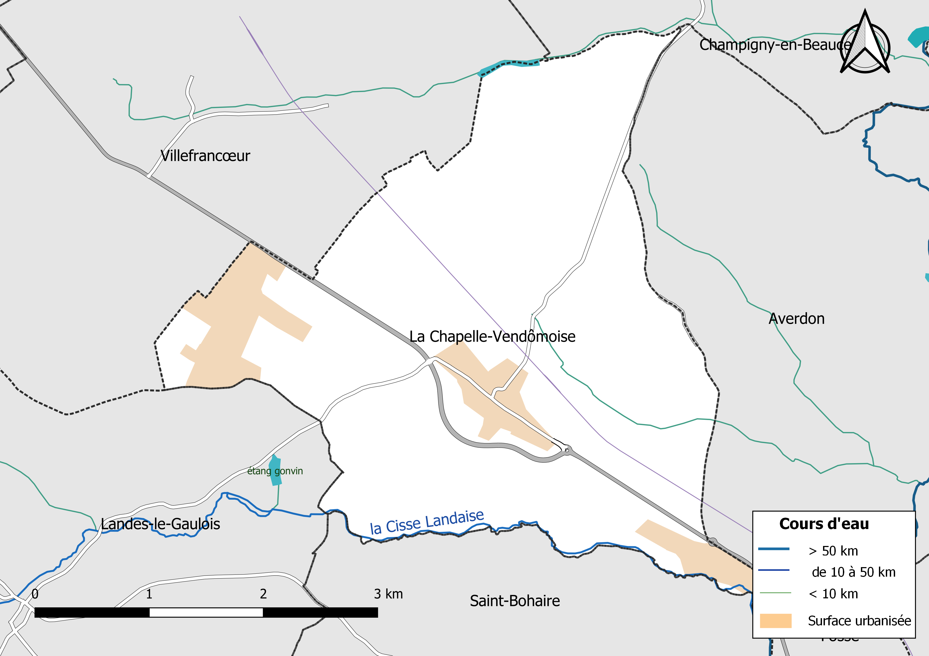 Carte du réseau hydrographique de la commune de La Chapelle-Vendômoise (Loir-et-Cher, France).